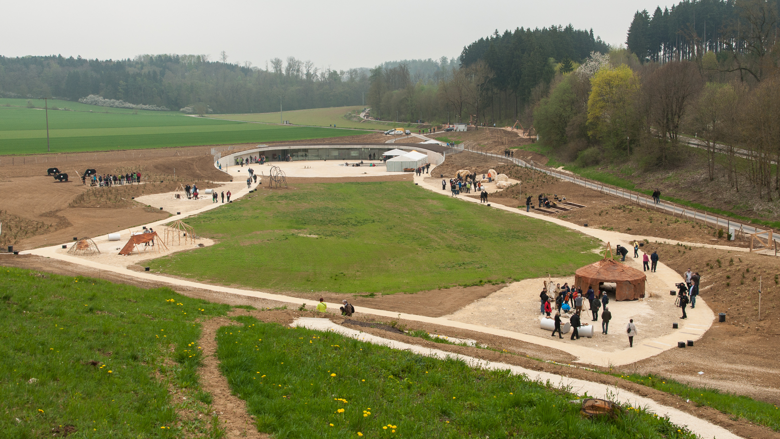 Der Archäopark Vogelherd am Tag der Eröffnung.